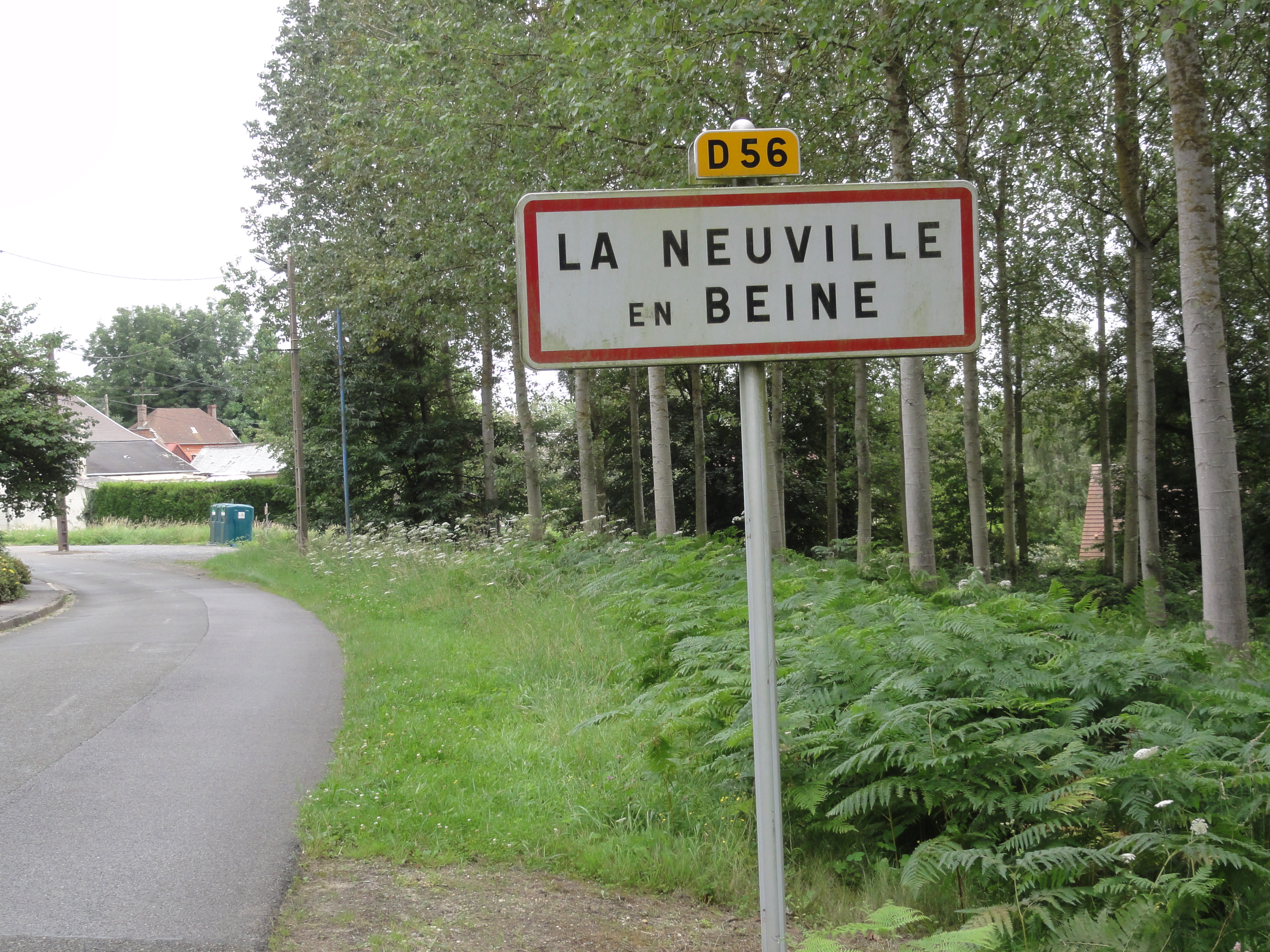 La Neuville-en-Beine (Aisne) city limit sign